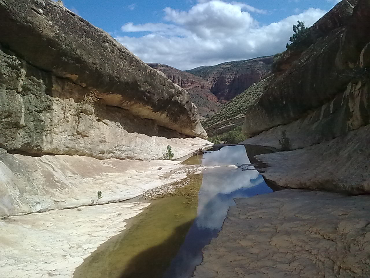 صورة من جبال بوزينة